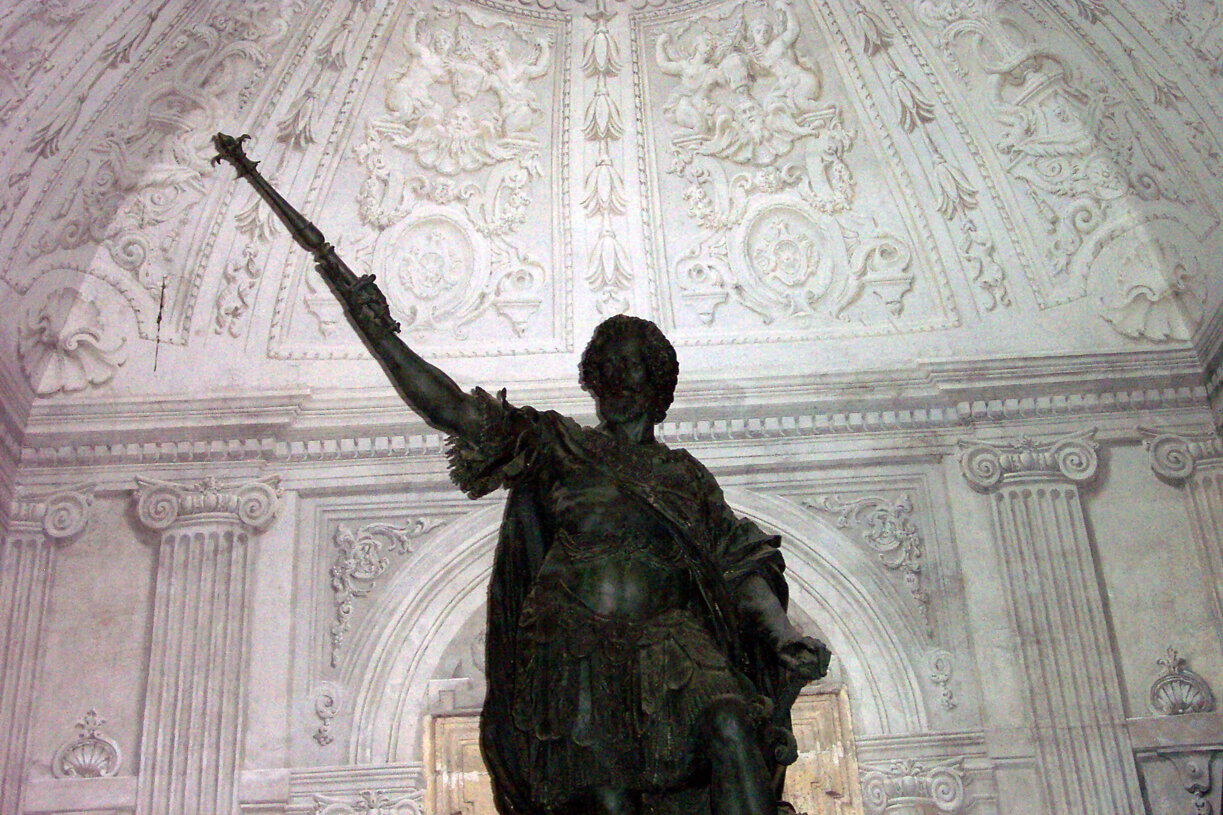 Basilica di San Giovanni in Laterano, Roma, Italy